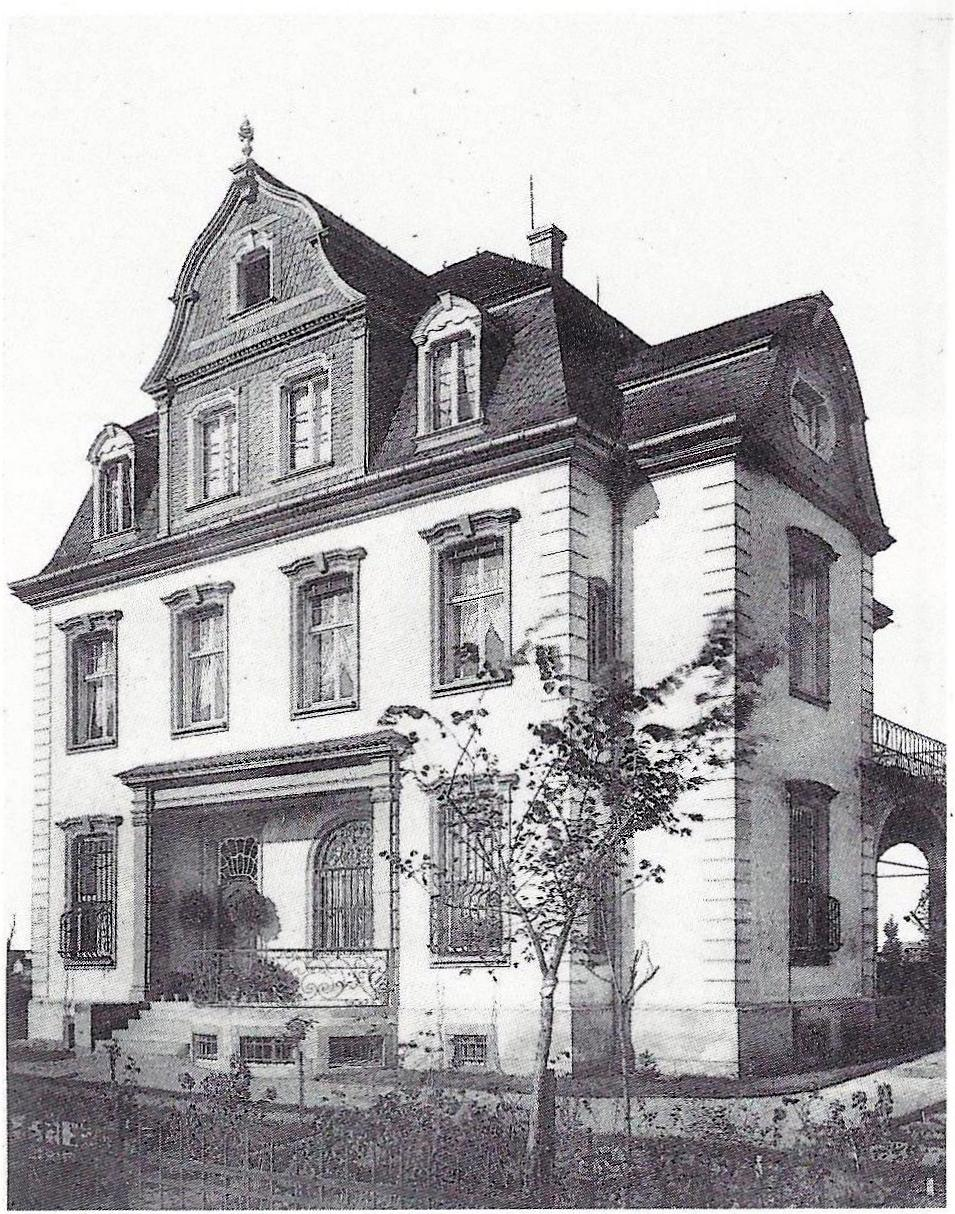 Villa Below (1974 abgebrochen), Marienburger Straße 28, Köln-Marienburg: Ansicht von Südosten